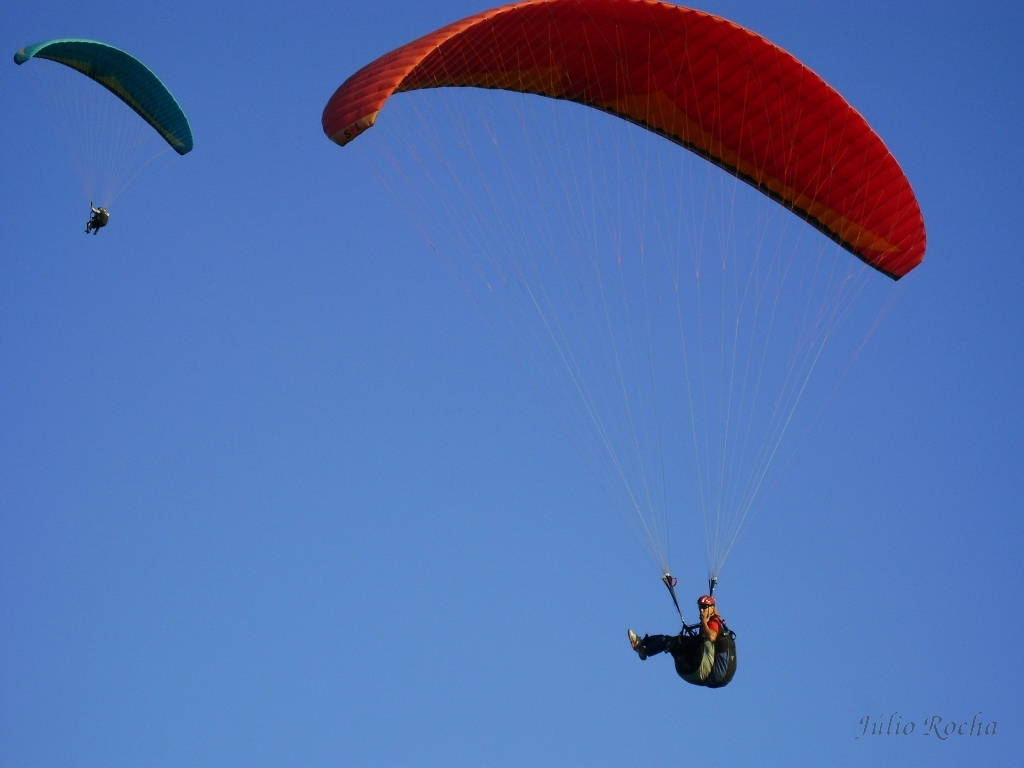 Voo de paraglider na Serra de Santa Helena - Sete Lagoas MG